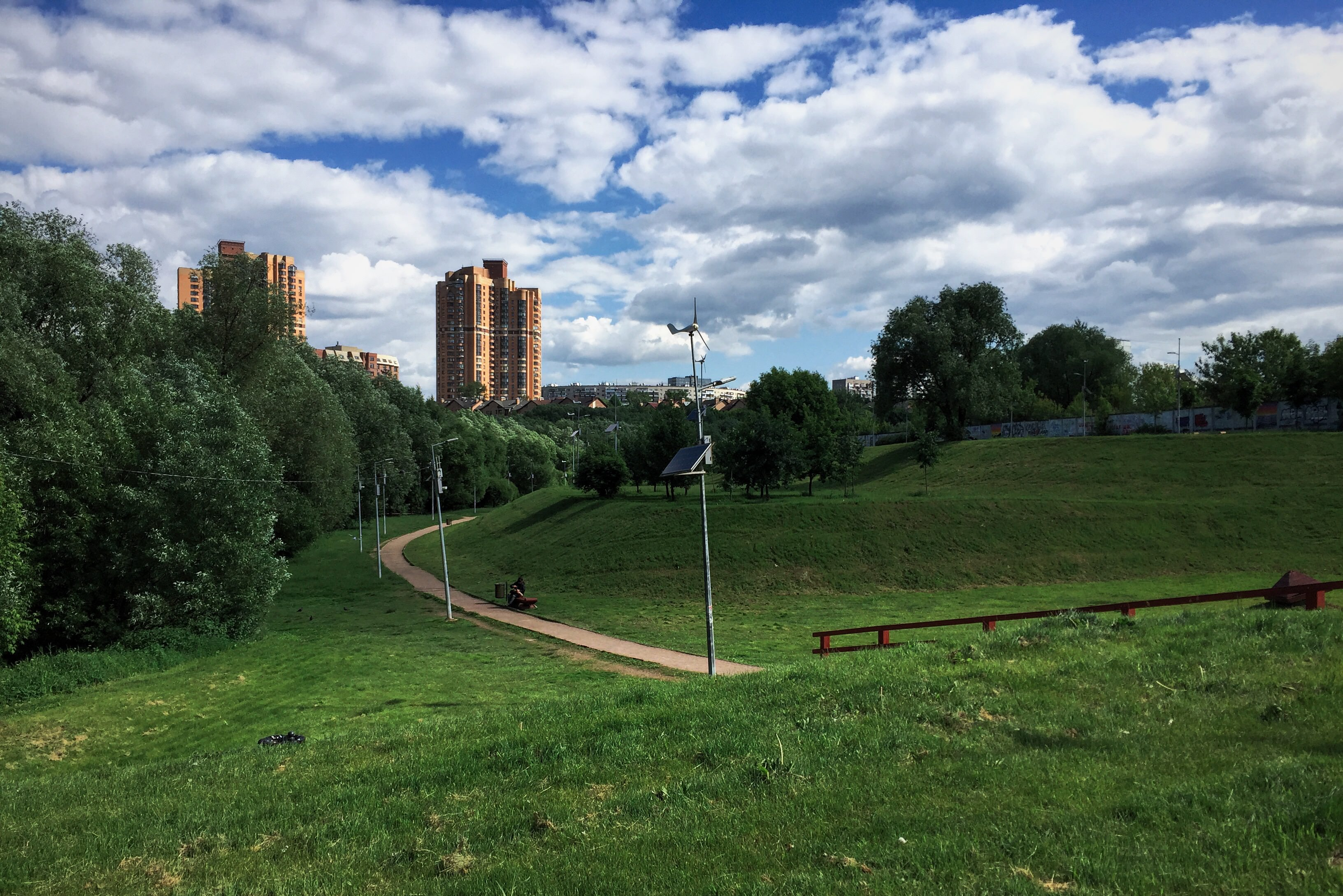 Долина реки Сетунь Moscow in 2016; Москва в 2016